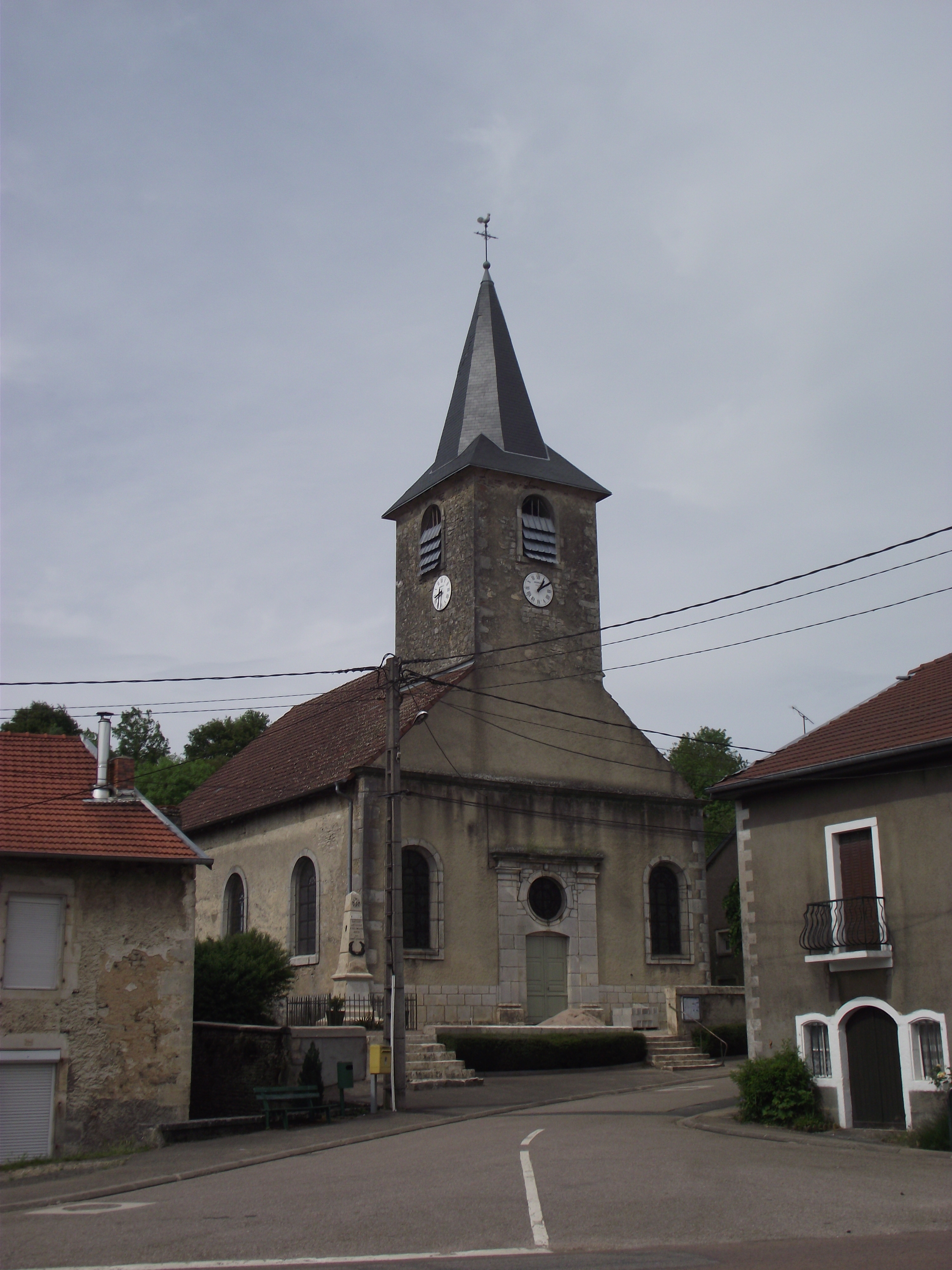 Église saint Léger à Martigny-les-Gerbonvaux